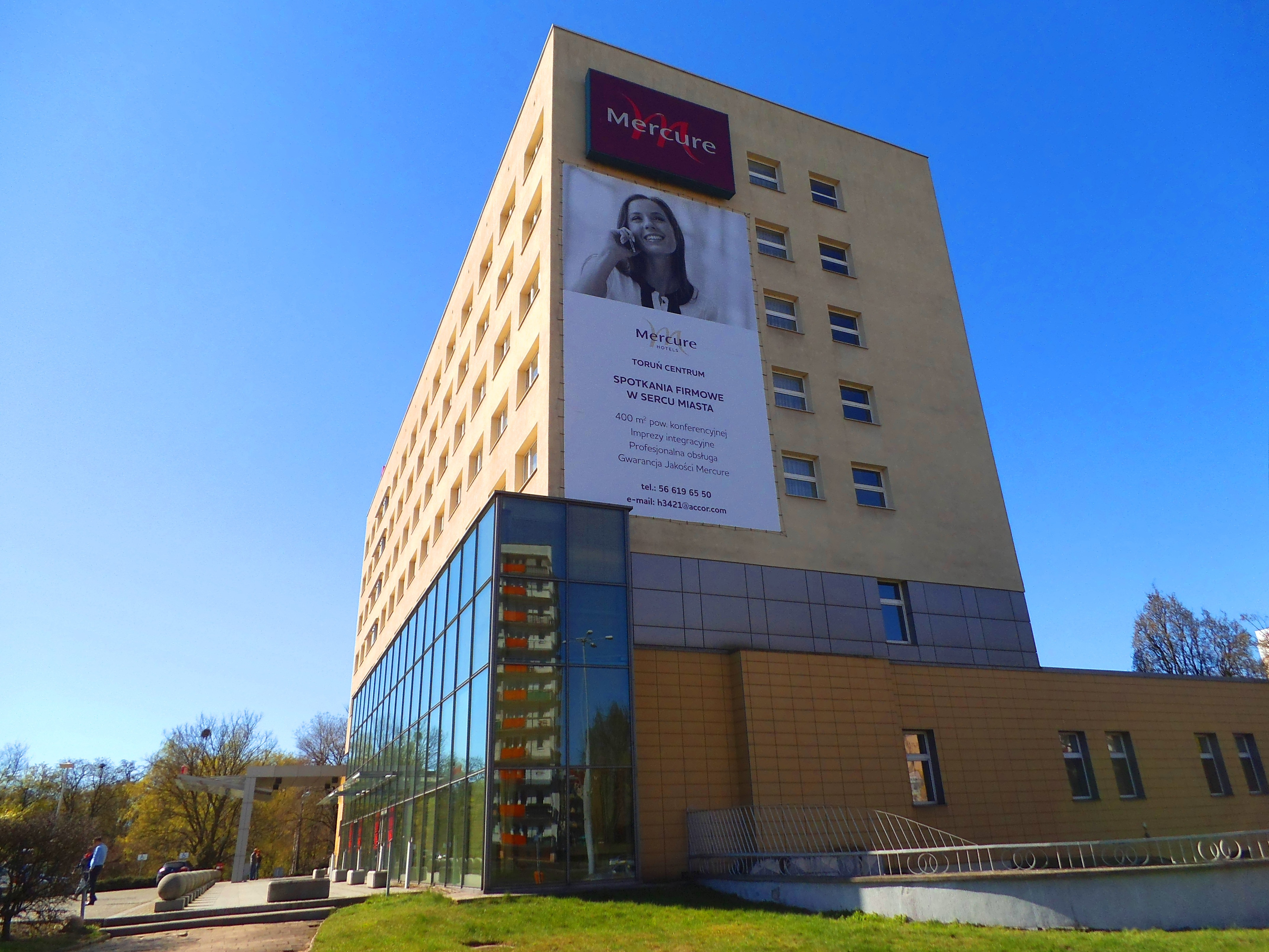 Hotel Mercure Toruń Centrum, 2015